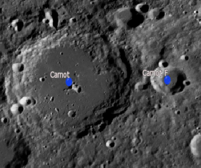 Cráter lunar Carnot . Cráteres satélite. (Imagen LRO)